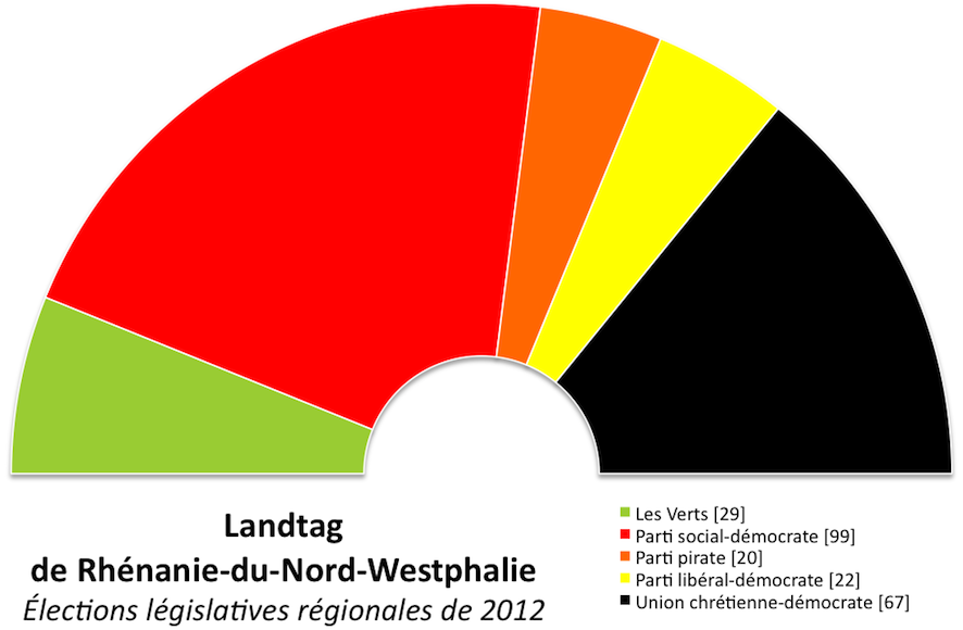 Composition politique du Landtag de Rhénanie-du-Nord-Westphalie après les élections régionales du 13 mai 2012.